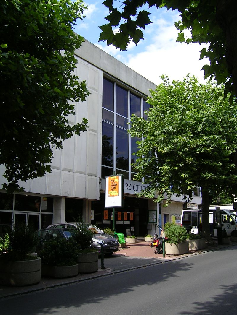 Le Centre culturel, boulevard du Midi Photo personnelle (own work) de Marianna